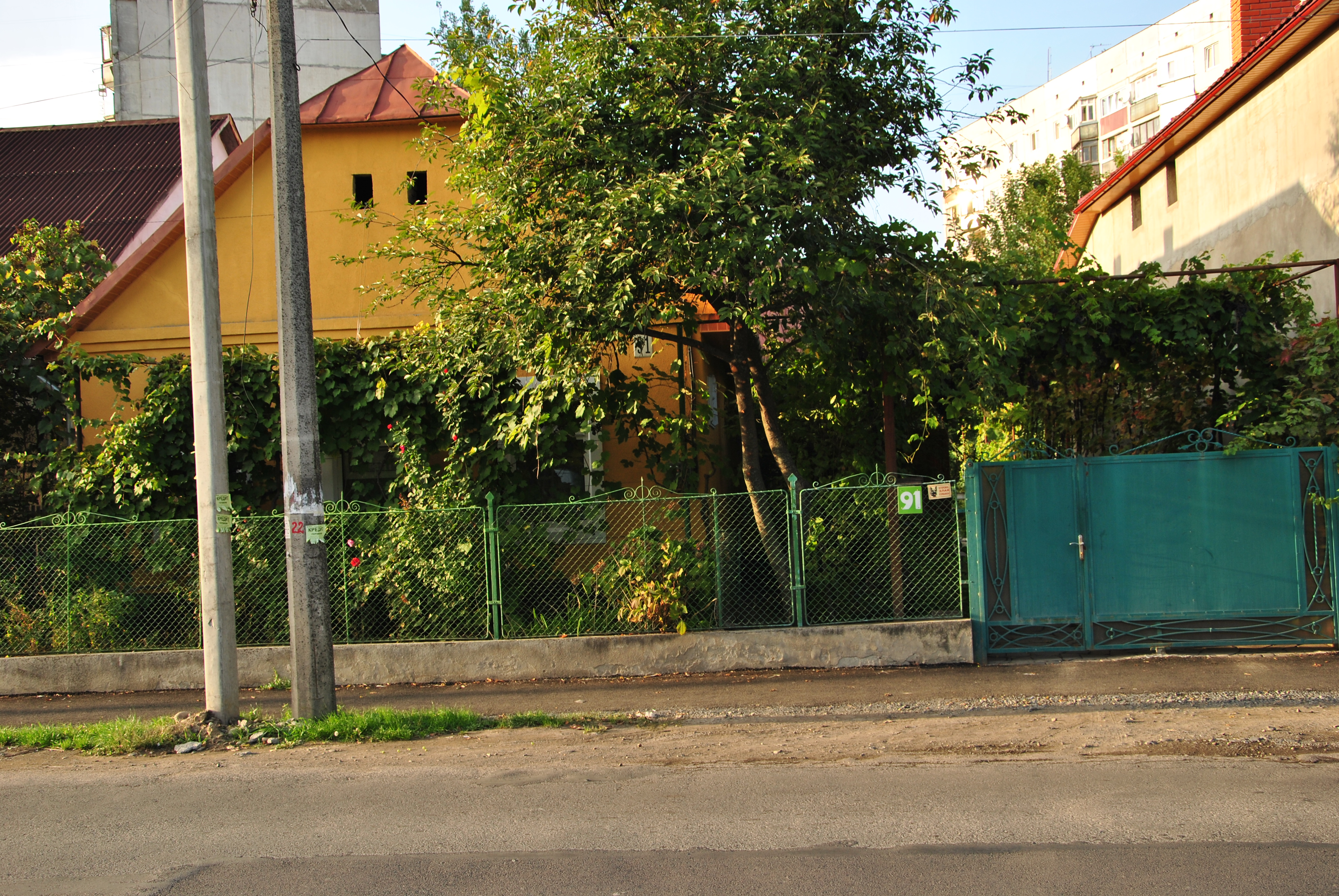 21-104-0033 Будинок, в якому жив і працював О.Митрак – український письменник, фольклорист та етнограф 1989 р. Мукачеве вул. Червоноармійська, 91 800 І-місц.